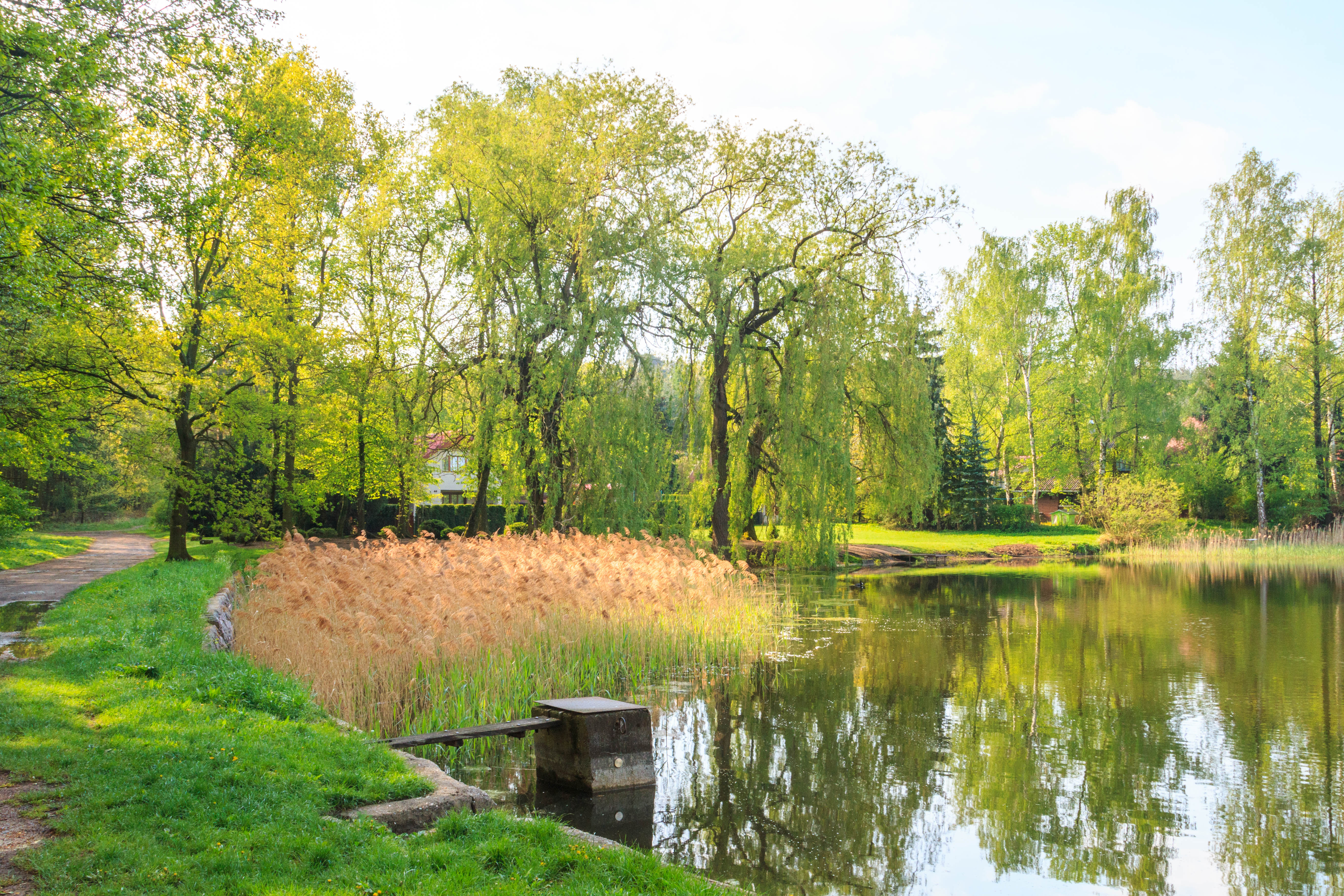 Březinský rybník u Klenovky Project: Vodstvo